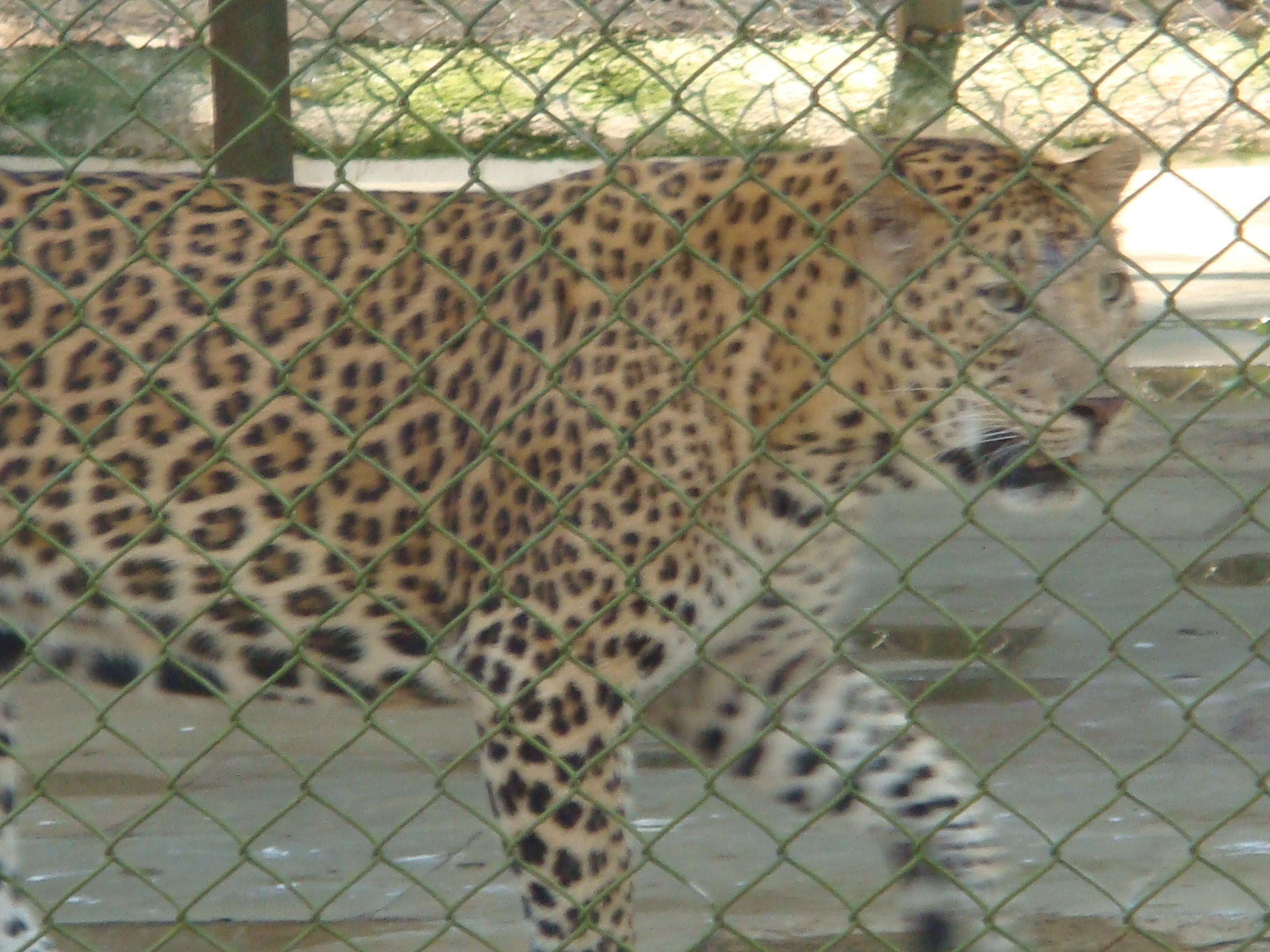 Leopard at Sanjay Gandhi National Park Mini Zoo